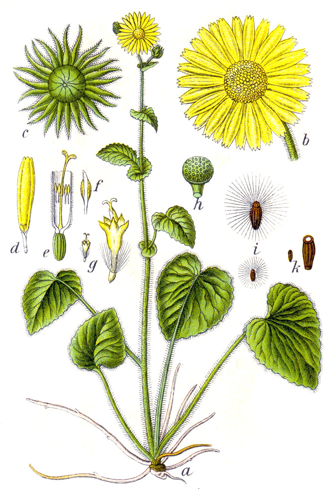 Doronicum pardalianches L. Original Caption Echte Gemswurz, Doronicum pardalianches